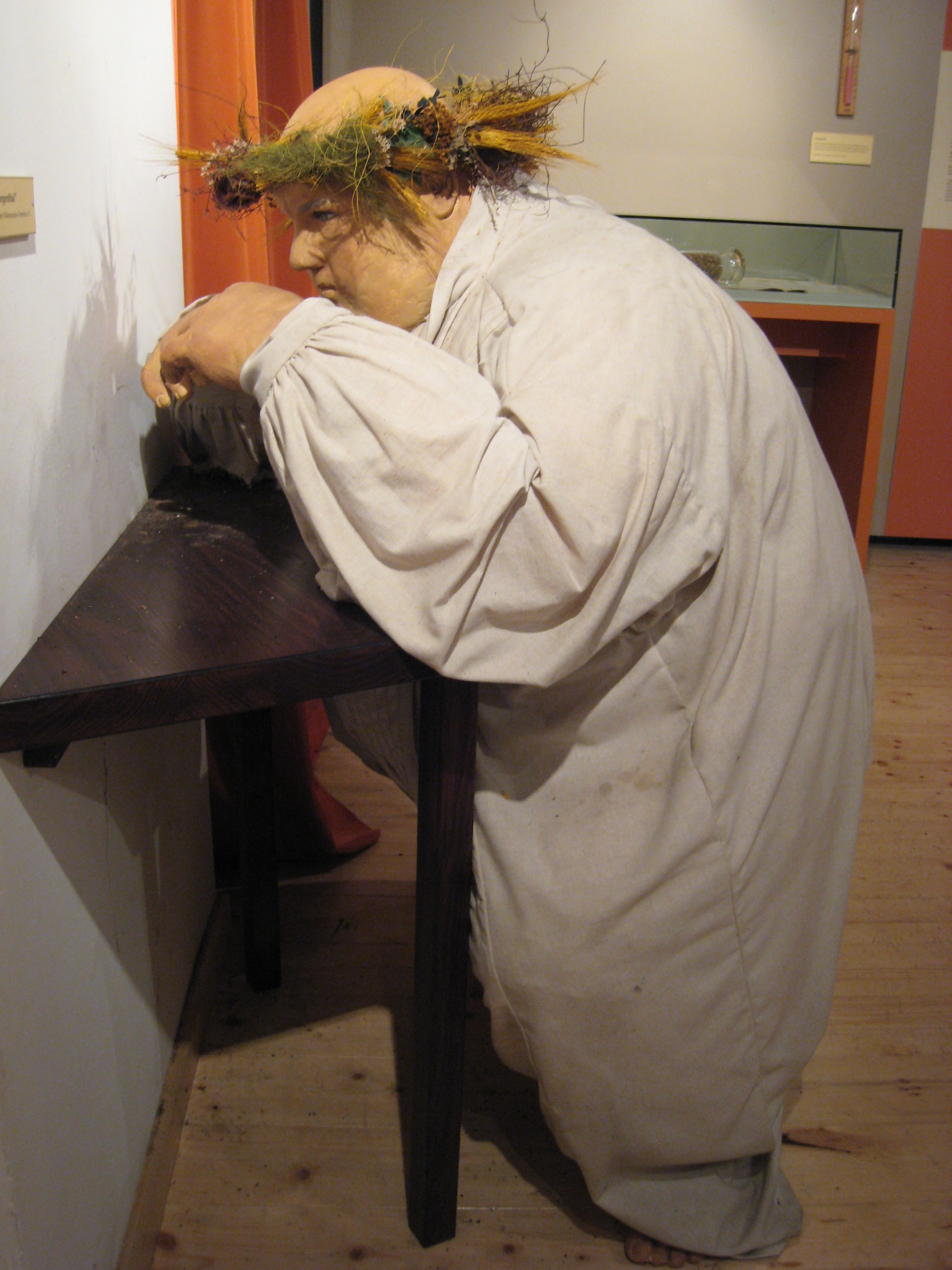 Friedrich Arnold Klockenbring, Lohmnühlenmuseum in Tambach-Dietharz, Strohpuppe